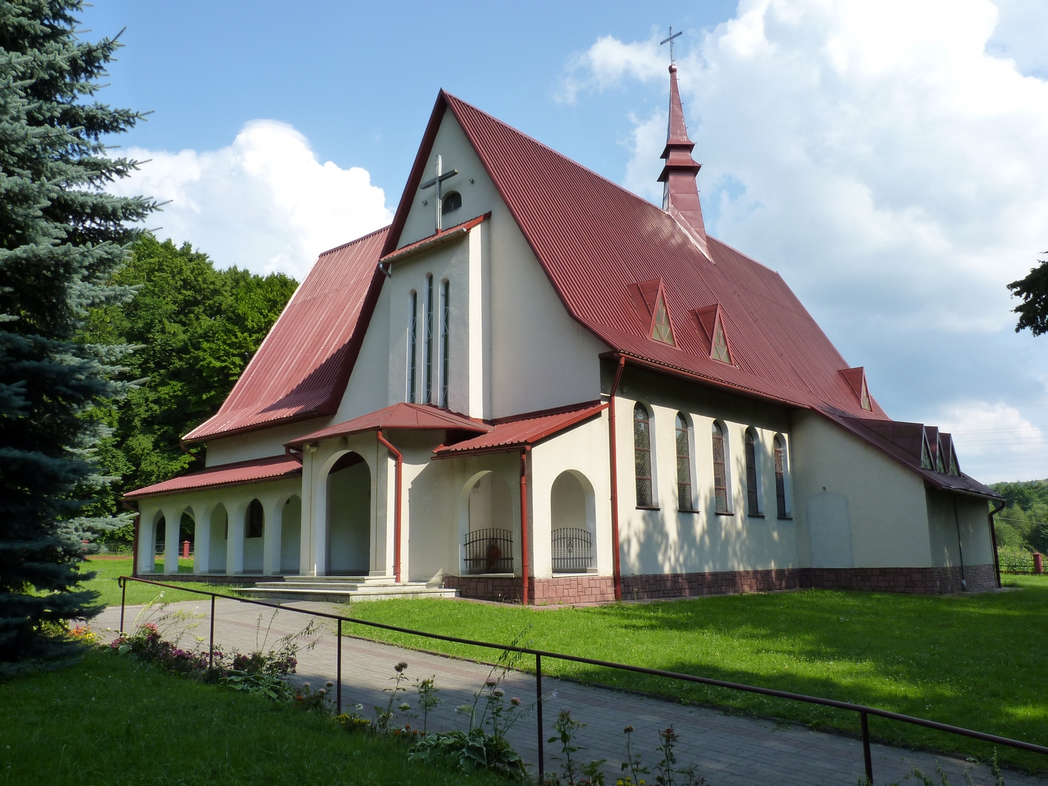 Kościół filialny pw. Matki Boskiej Częstochowskiej